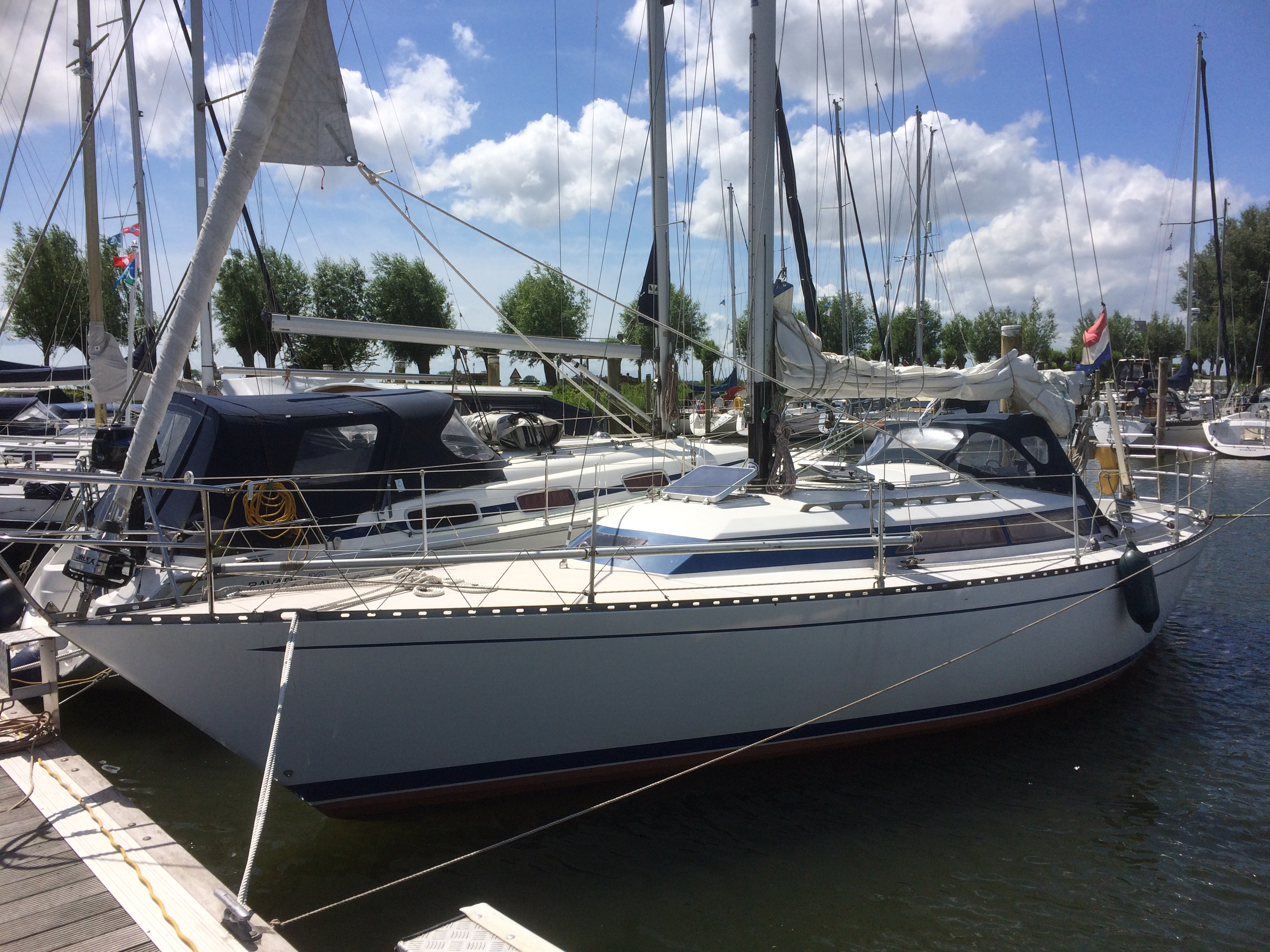 Ook in de haven is het goed toeven aan boord door de ruime kajuit met stahoogte (1.90 m), ruime kuip en brede gangboorden.